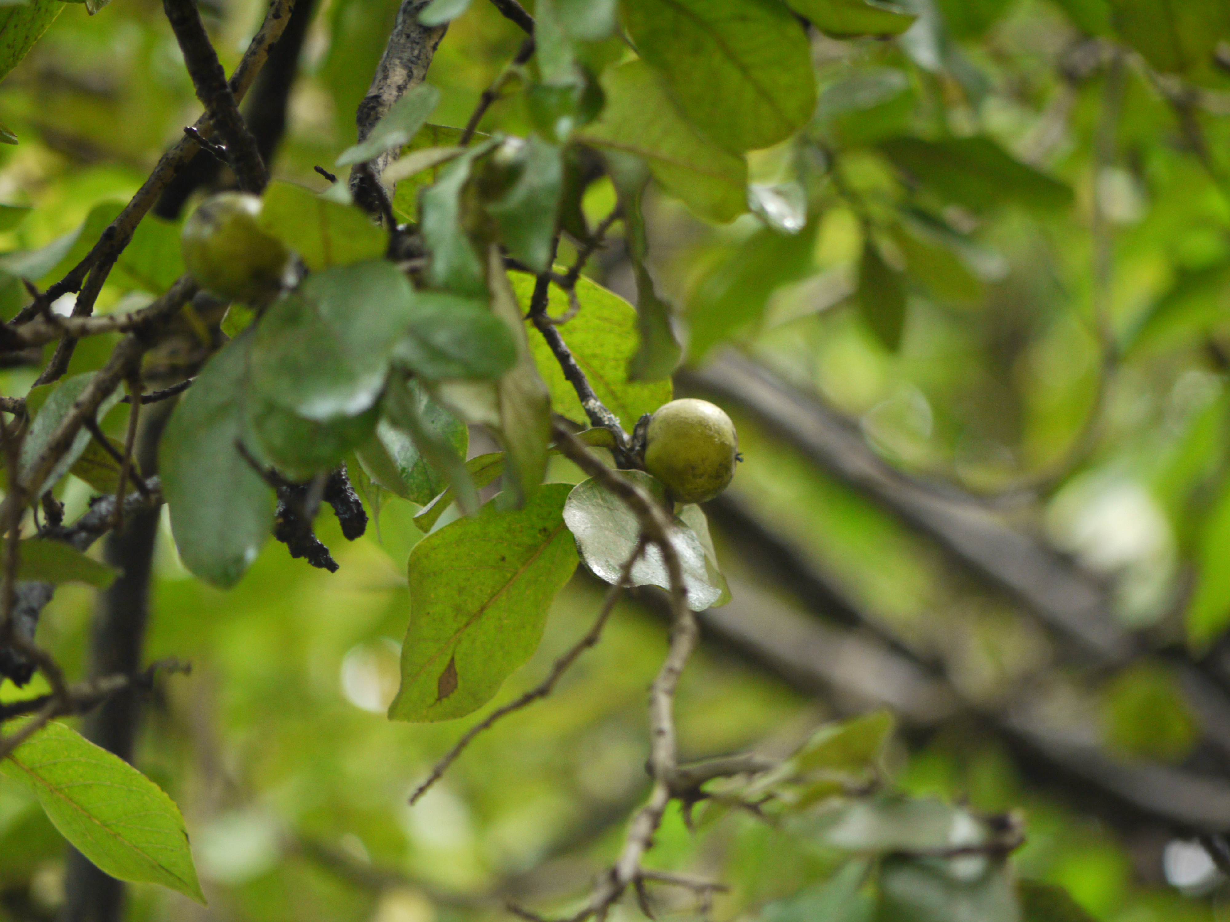 Diospyros montana